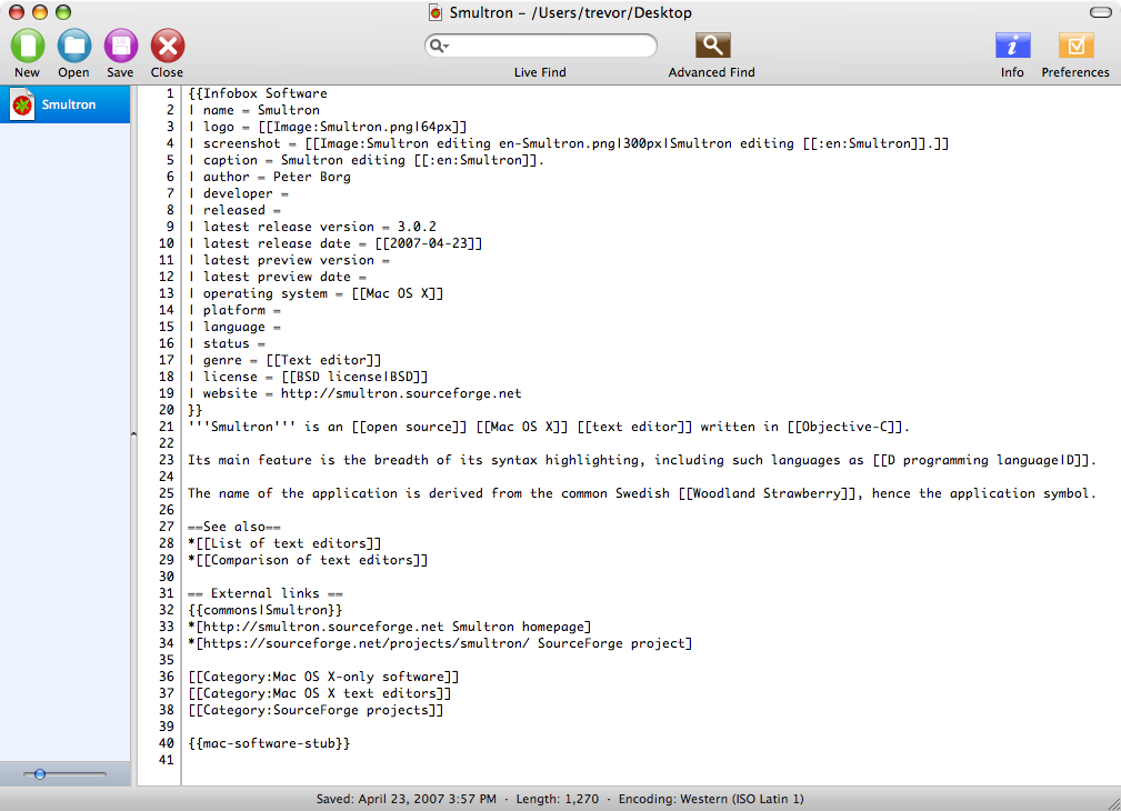 Smultron editing Smultron.